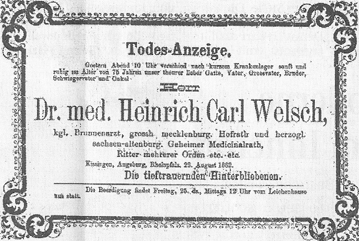 Todesanzeige von Heinrich Carl Welsch (1807-1882)